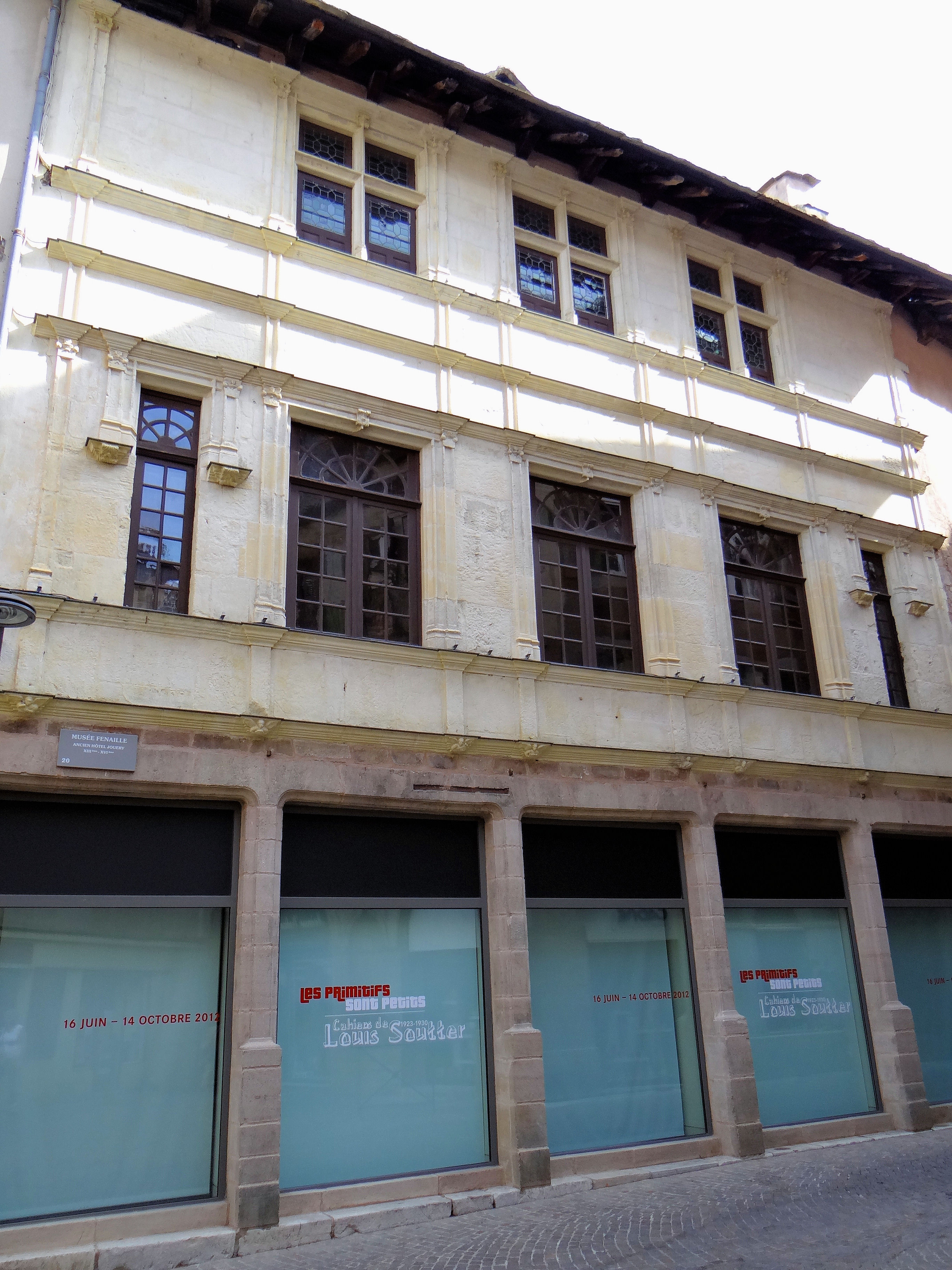 Rodez - Musée Fenaille - Hôtel Jouéry, rue Saint-Just